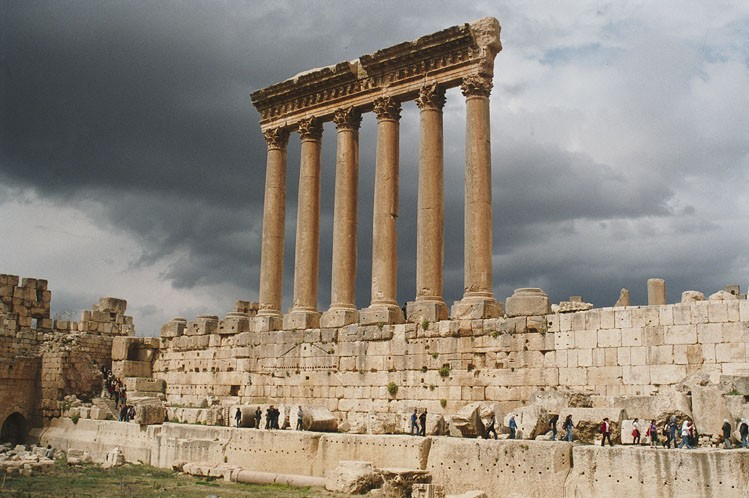 Colonnade du temple de Jupiter à Baalbeck, Liban